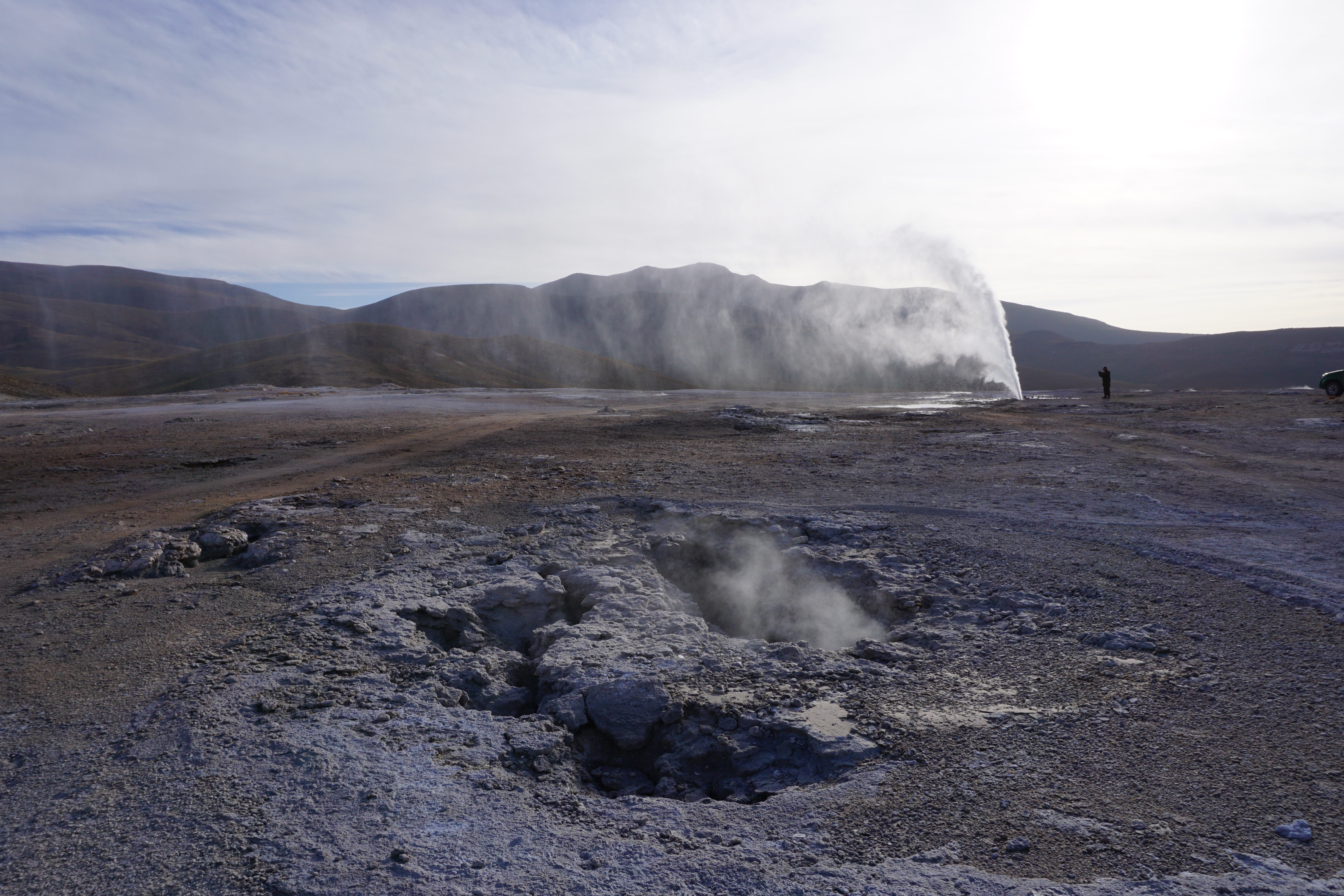 geysers de Puchuldiza